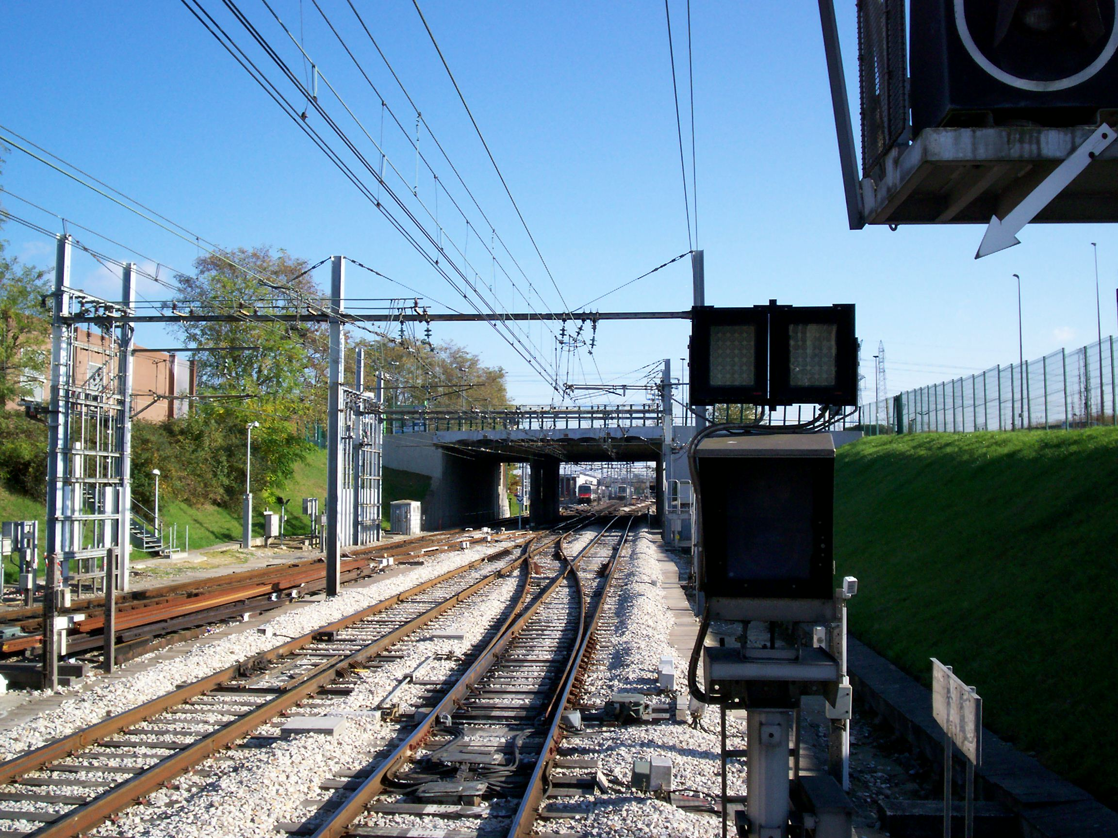 Gare de Torcy